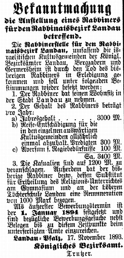 Stellenausschreibung von 1835 für einen Rabbiner in Landau/Pfalz